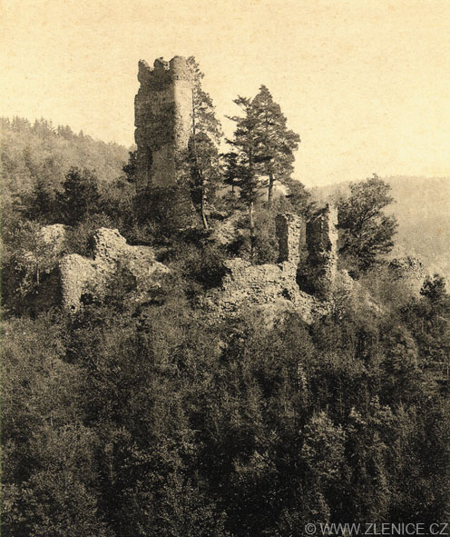 Pohled na hrad Zlenice, 1880.